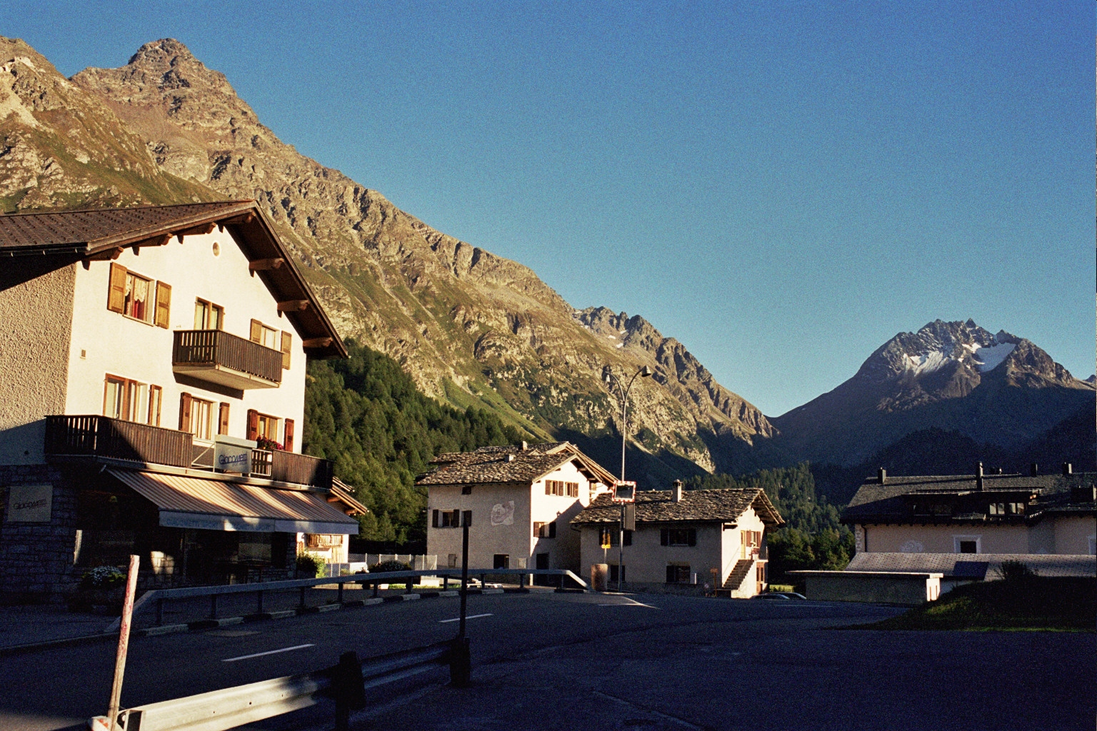 Maloja main road